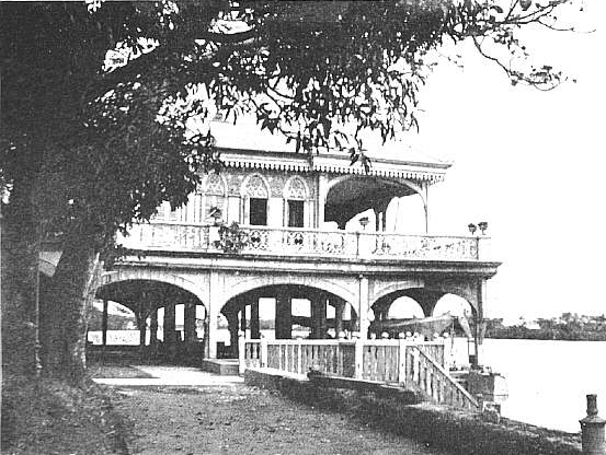 Malacañang Palace and River Pasig, Manila 1898